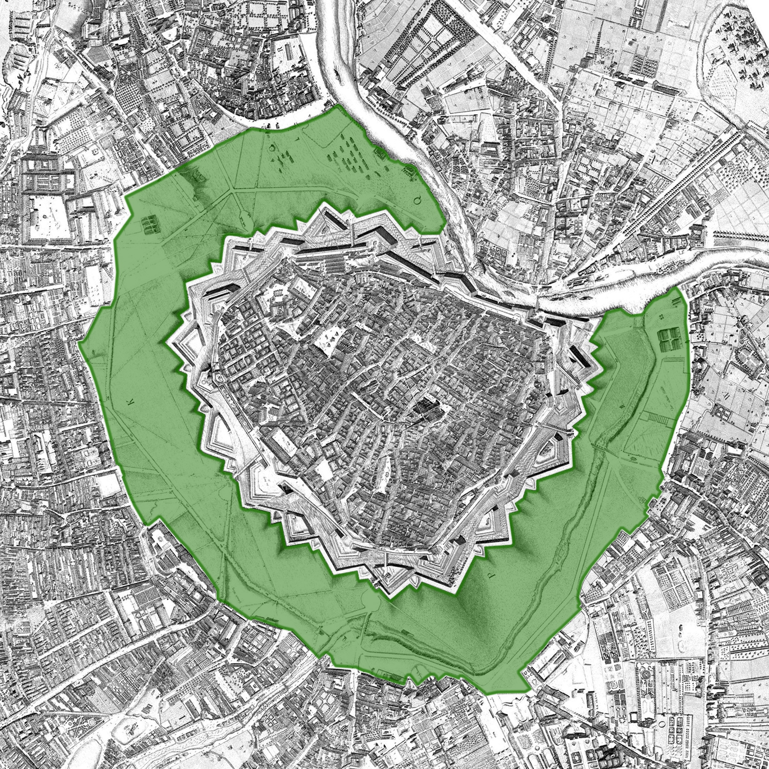 Wiener Glacis 1773, Basiskarte von Joseph Daniel von Huber, genordet, Grafik von user:Gugerell